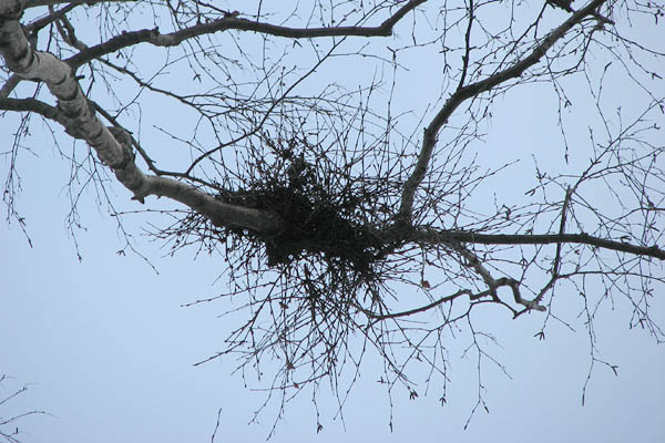 Taphrina betulina on Betula pubescens